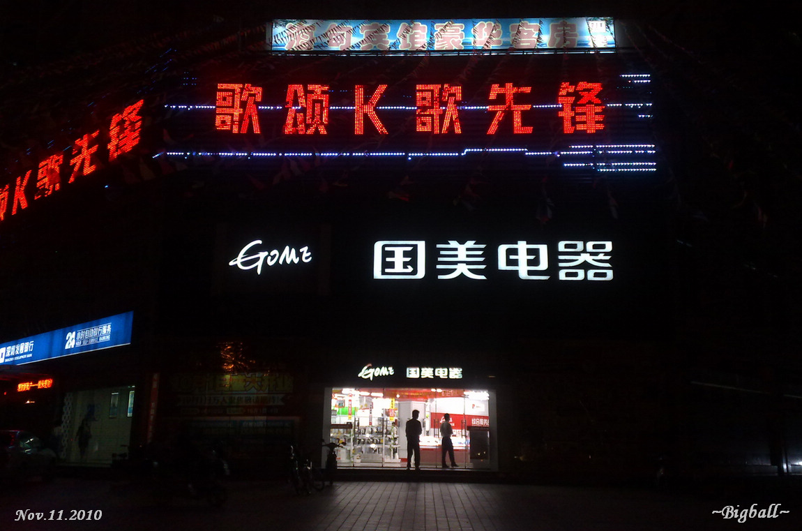 国美电器-By Bigball